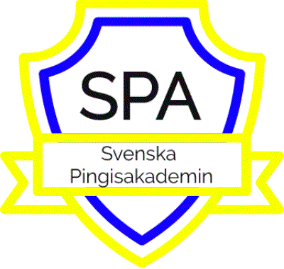 Since 1979